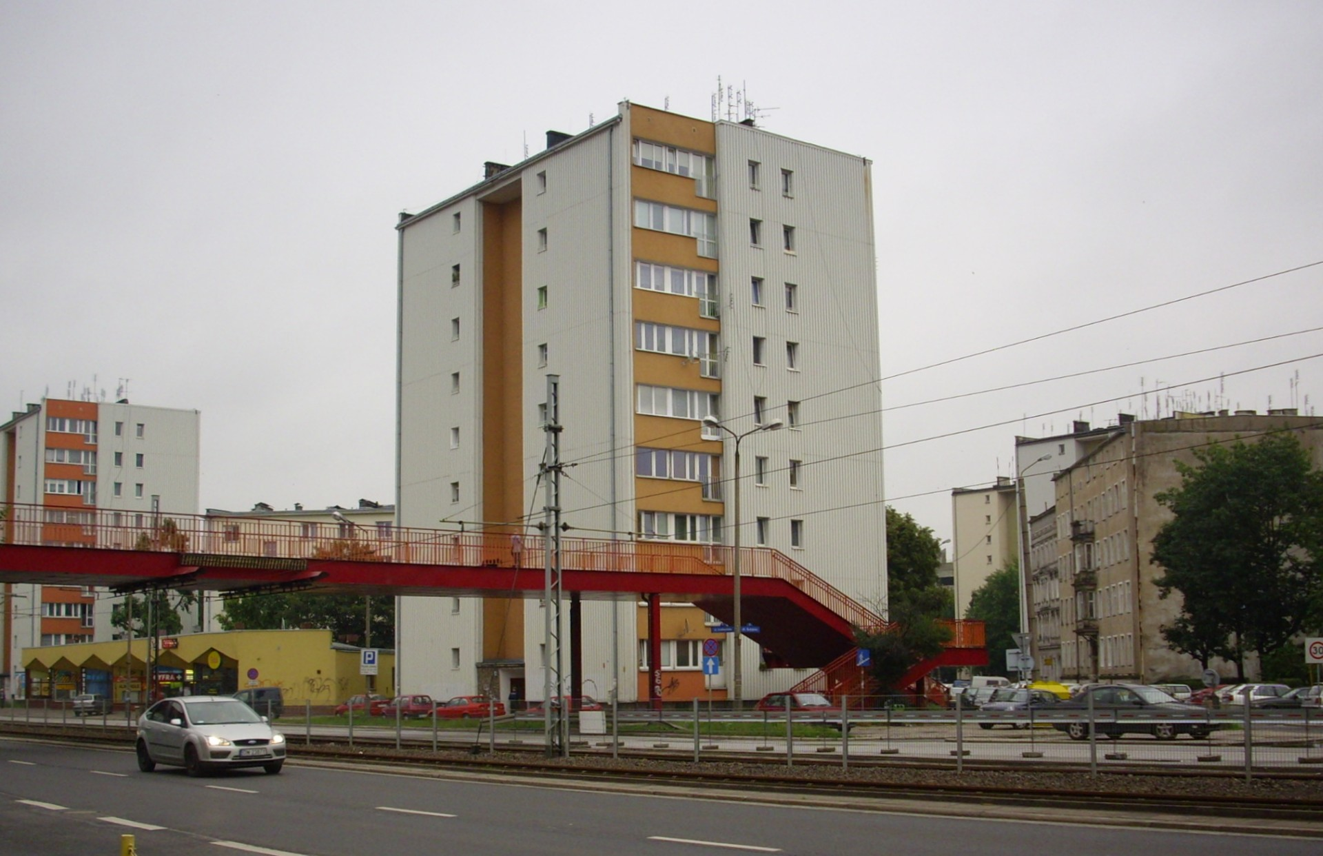 Wrocław, ul. Grabiszyńska róg ul. Kolejowej. Kładka dla pieszych wybudowana ok. roku 1980, w głębi budynek mieszkalny z lat 60. XX w.